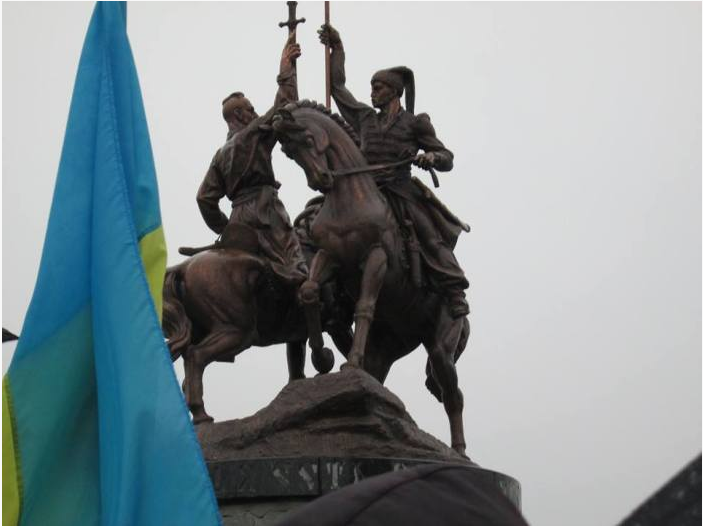 Гонта та Залізняк